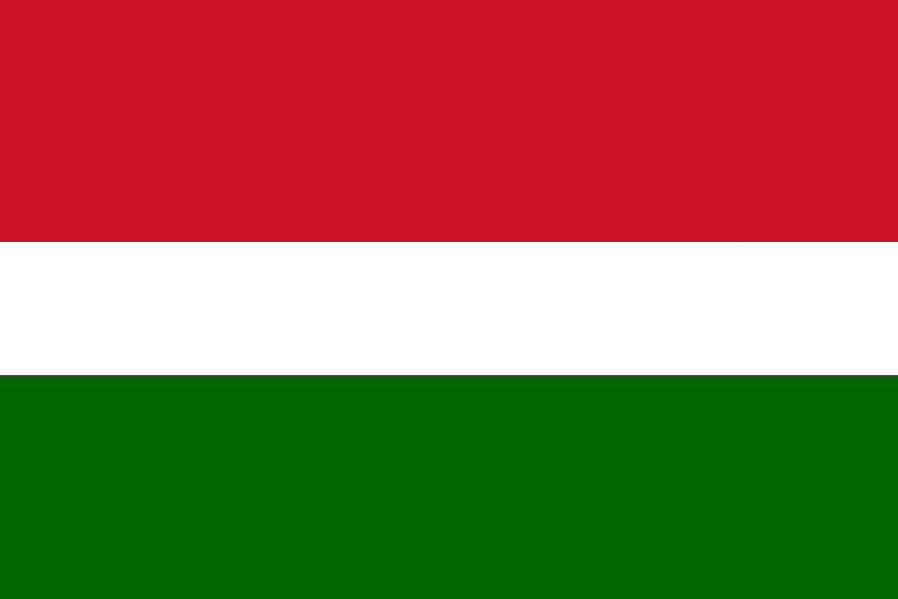 La Bandera Herreruna, está conformada por tres franjas horizontales: ROJA, BLANCA Y VERDE. El Rojo: Simboliza El espíritu aguerrido y emprendedor de su orgulloso ancestro. También la sangre de sus hijos derramada en épocas violentas y aún en nuestro días. El BLANCO: (Faja más angosta que las demás). Simboliza la paz y sosiego de un pueblo con corazón limpio, deseoso de trabajar y prosperar. El VERDE: Representa sus riquezas naturales, también la esperanza.